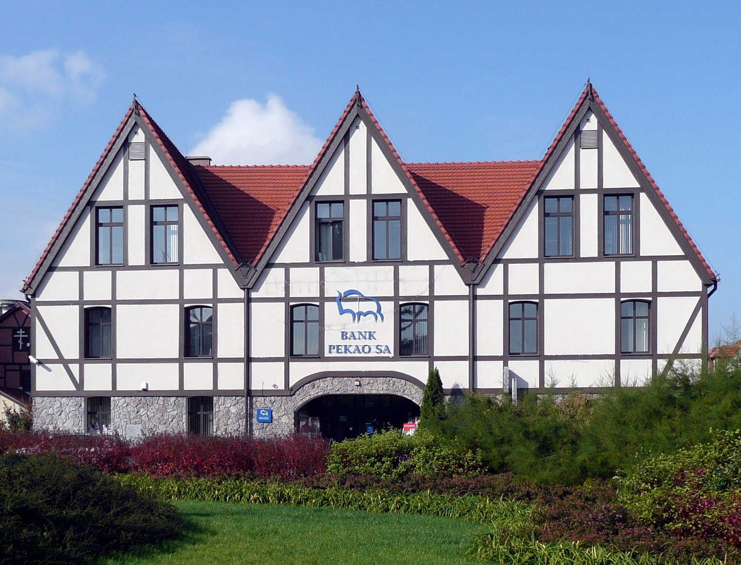 Oddział Banku Pekao SA w Bydgoszczy, ul. Trybunalska 2